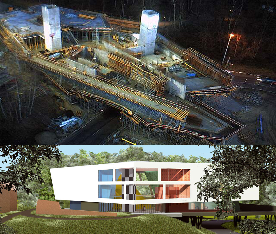 Atelier Christian de Portzamparc